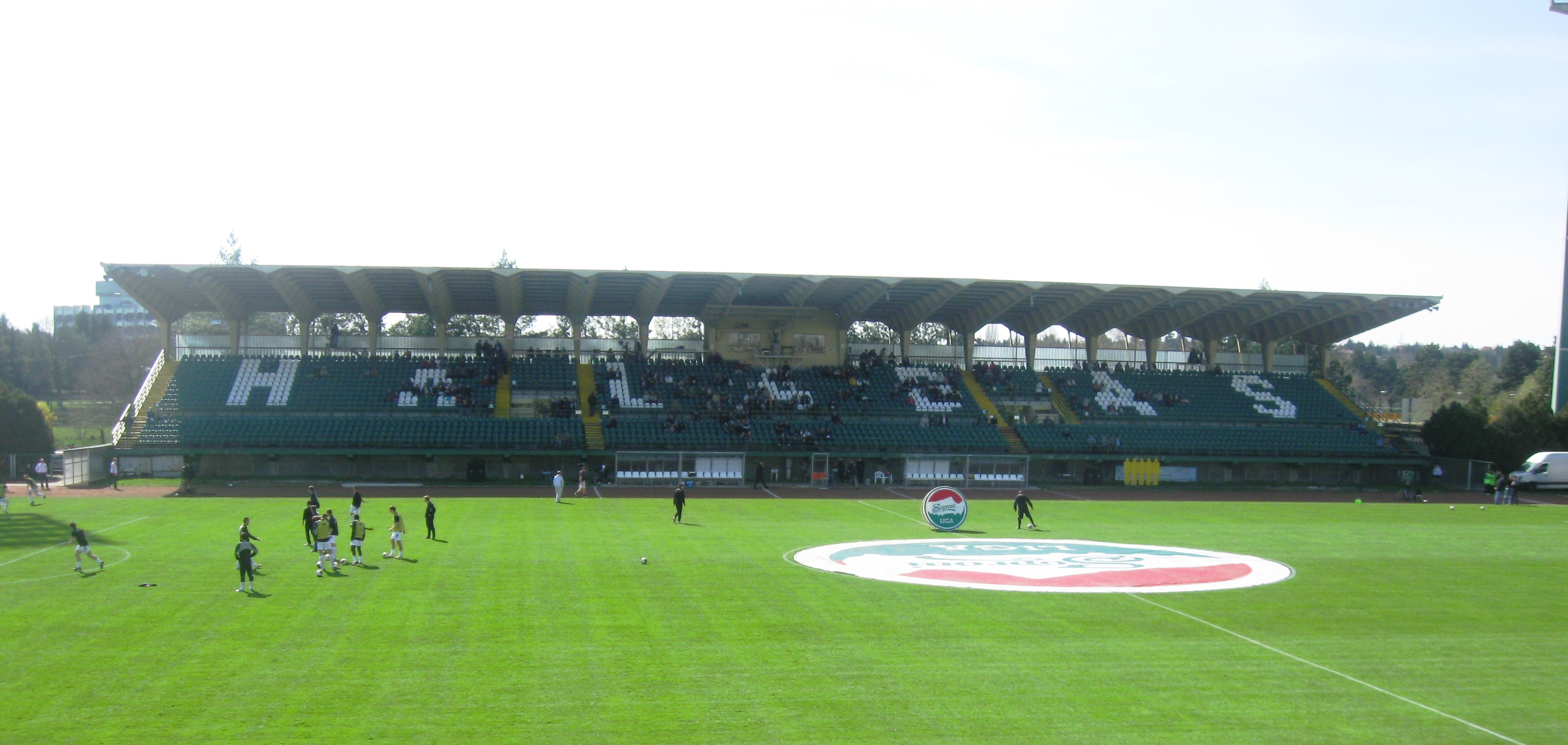 A szombathelyi Rohonci úti stadionjának főtribünje 2010-ben